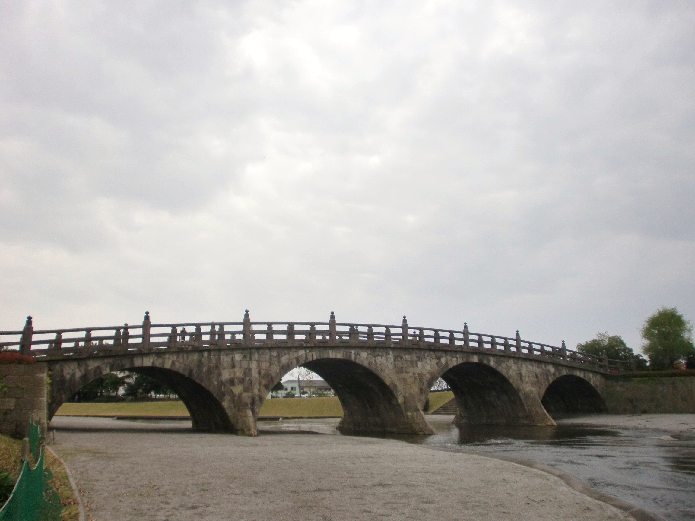 甲突川五石橋のうちの一つであった西田橋は現在石橋記念公園に移設復元されている。